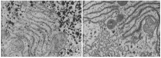 Elektronenmikroskopische Aufnahme der Lebern unbehandelter und Phenobarbital-benadelter Ratten